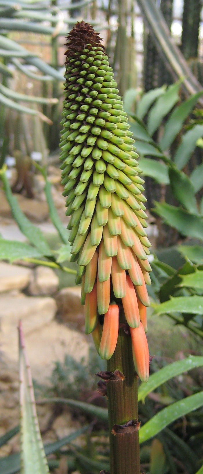 Aloe reitzii im Botanischen Garten Dresden